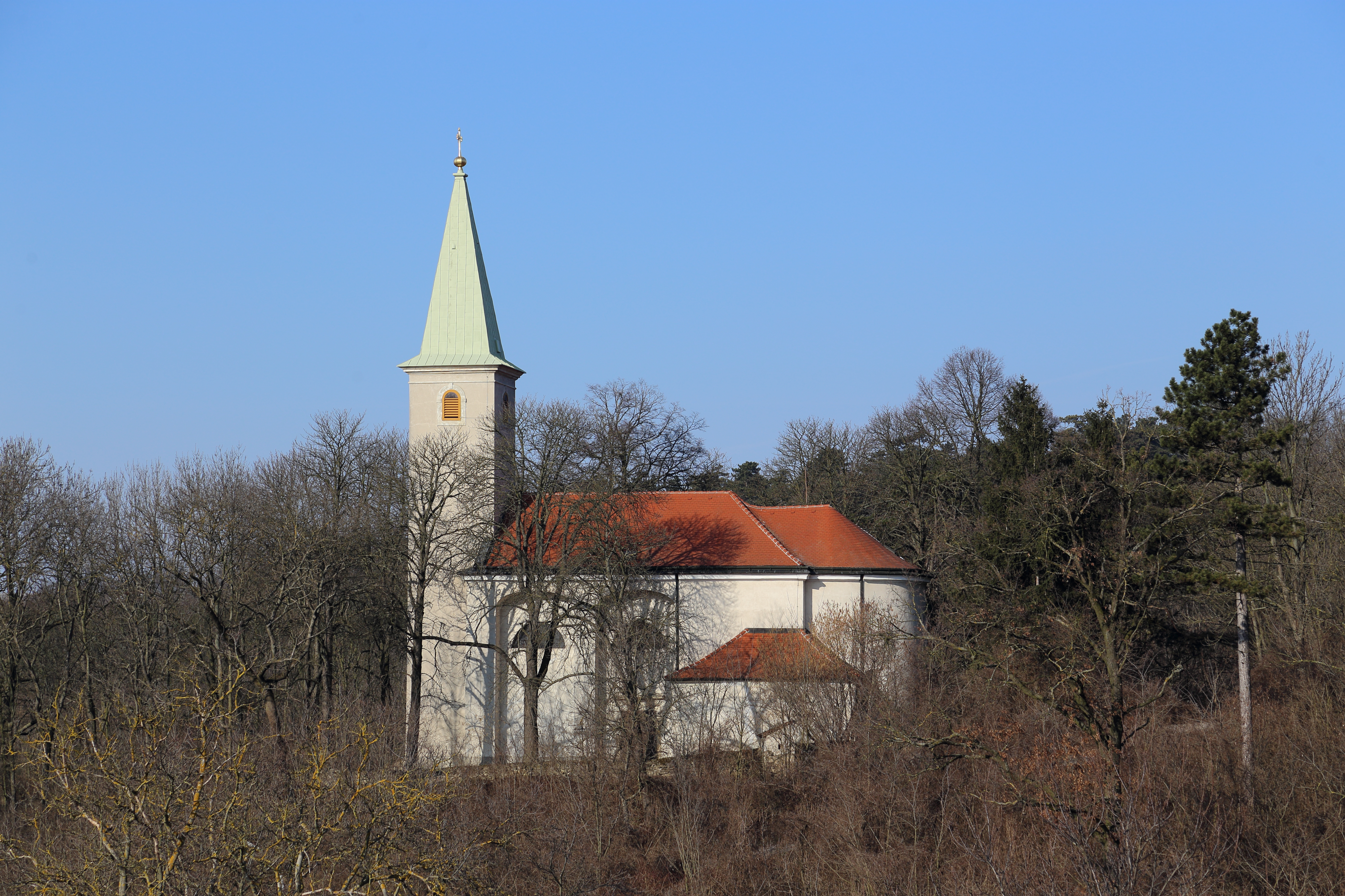 Südansicht der katholischen Wallfahrtskirche hl. Lambert am Heiligenberg in Hautzendorf, ein Ortsteil der niederösterreichischen Gemeinde Kreuttal.